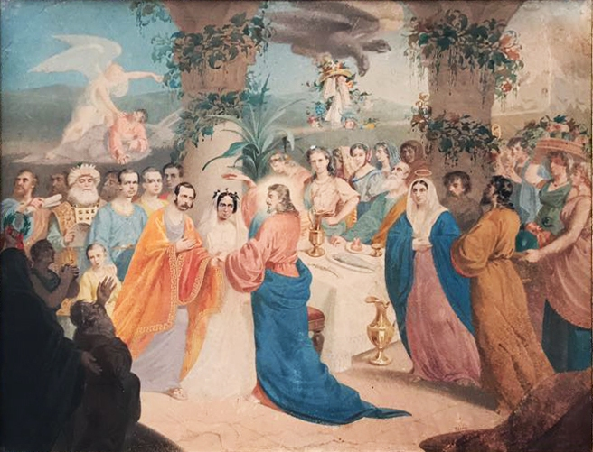 Церм Петр Иванович - Небесное благословение 25-летнего союза императора Александра II и императрицы Марии Александровны